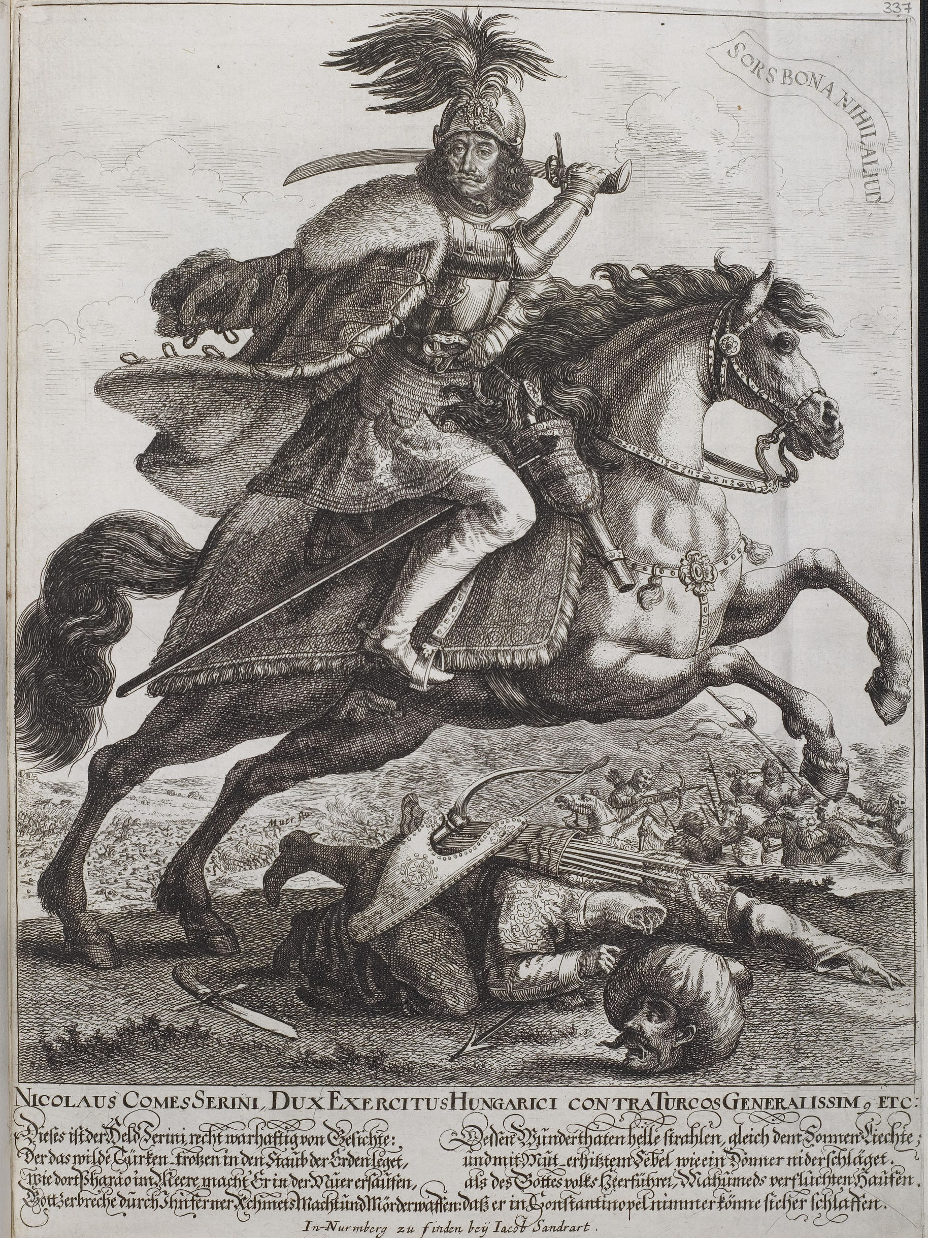 Grafik aus dem Klebeband Nr. 2 der Fürstlich Waldeckschen Hofbibliothek Arolsen Motiv: Nikolaus Zrinski